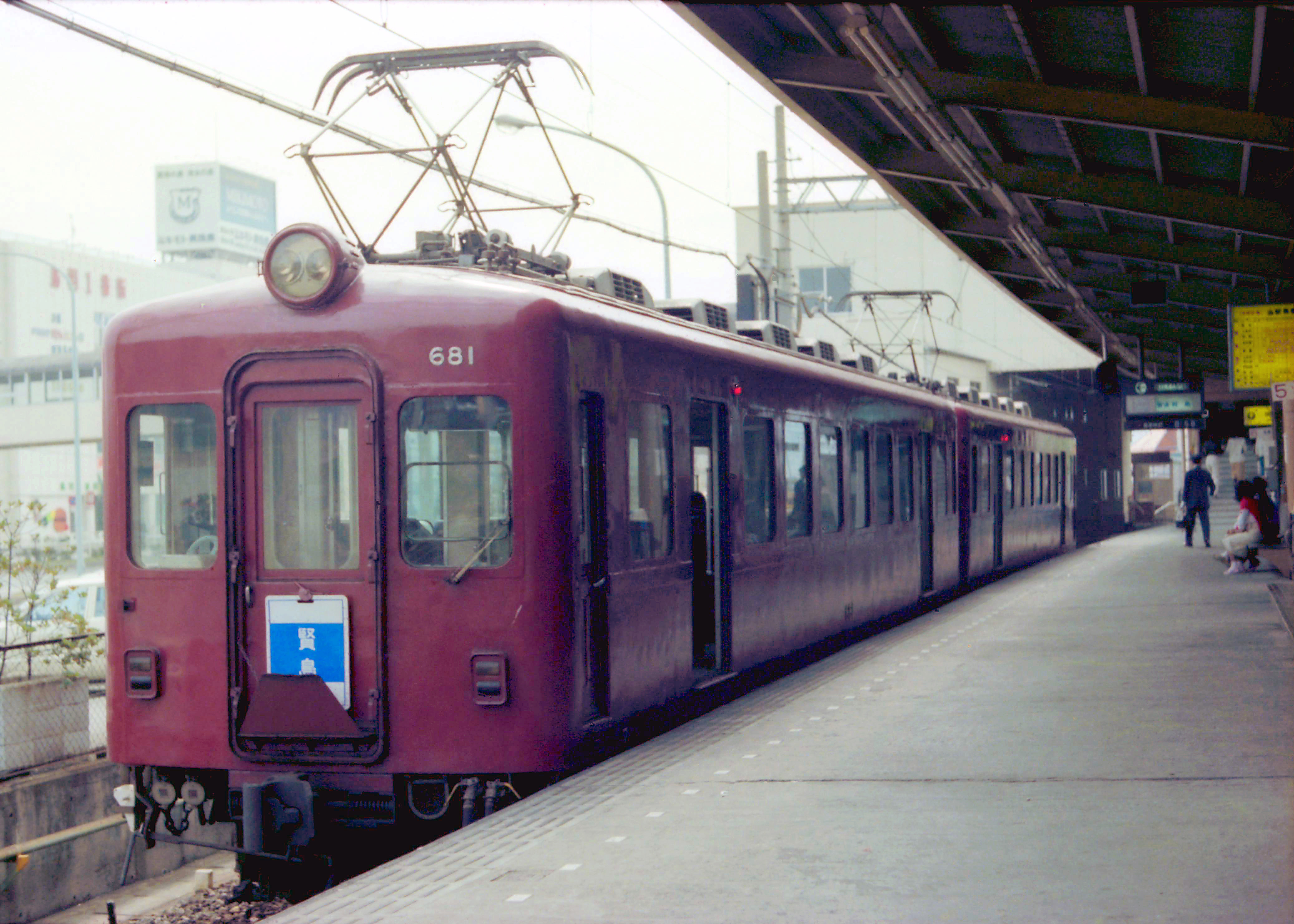 近鉄 681 鳥羽駅 S55-5-3